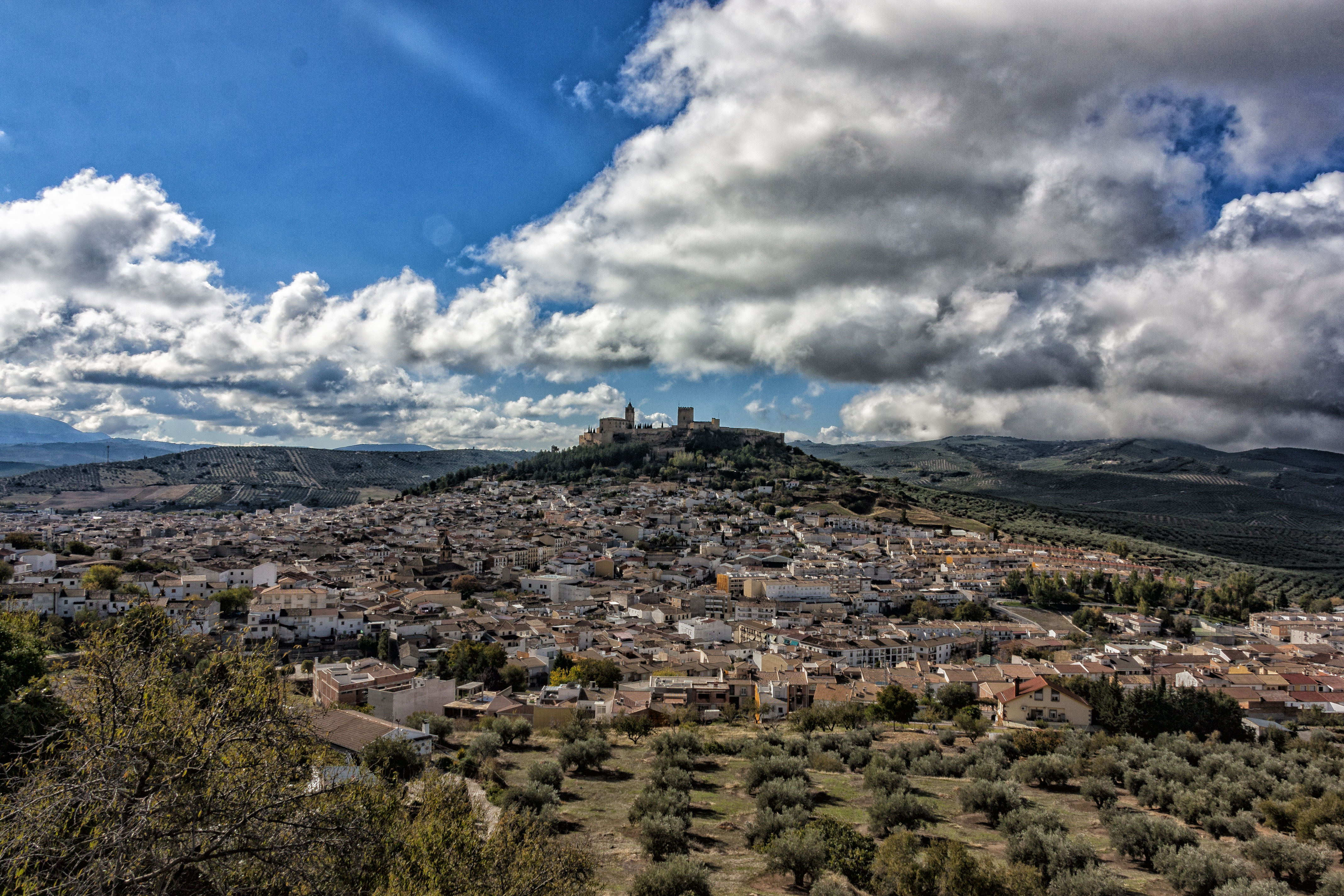 Vista panaramica de Alcala la Real, coronada por la Fortaleza de la Mota.